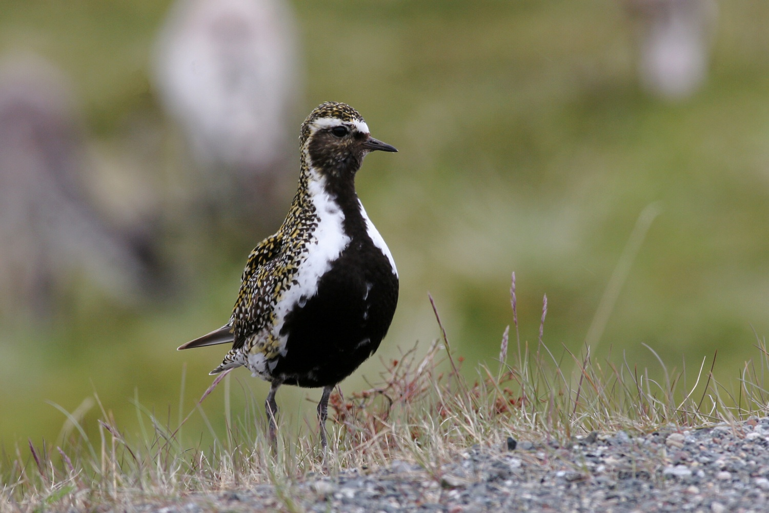 Vardo, Varanger, Nórsko